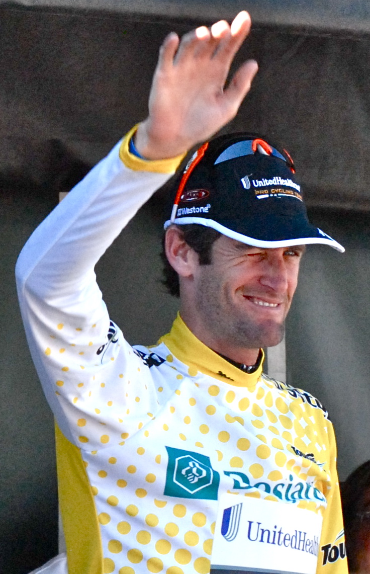 Rory Sutherland, à la fin de la cinquième et avant-dernière étape du Tour de Beauce 2012, disputée le 16 juin 2012 à Québec, alors qu'il conserve le maillot jaune du leader au classement général. Le lendemain, à la fin de la dernière étape, il termine vainqueur de l'ensemble du Tour de Beauce 2012.